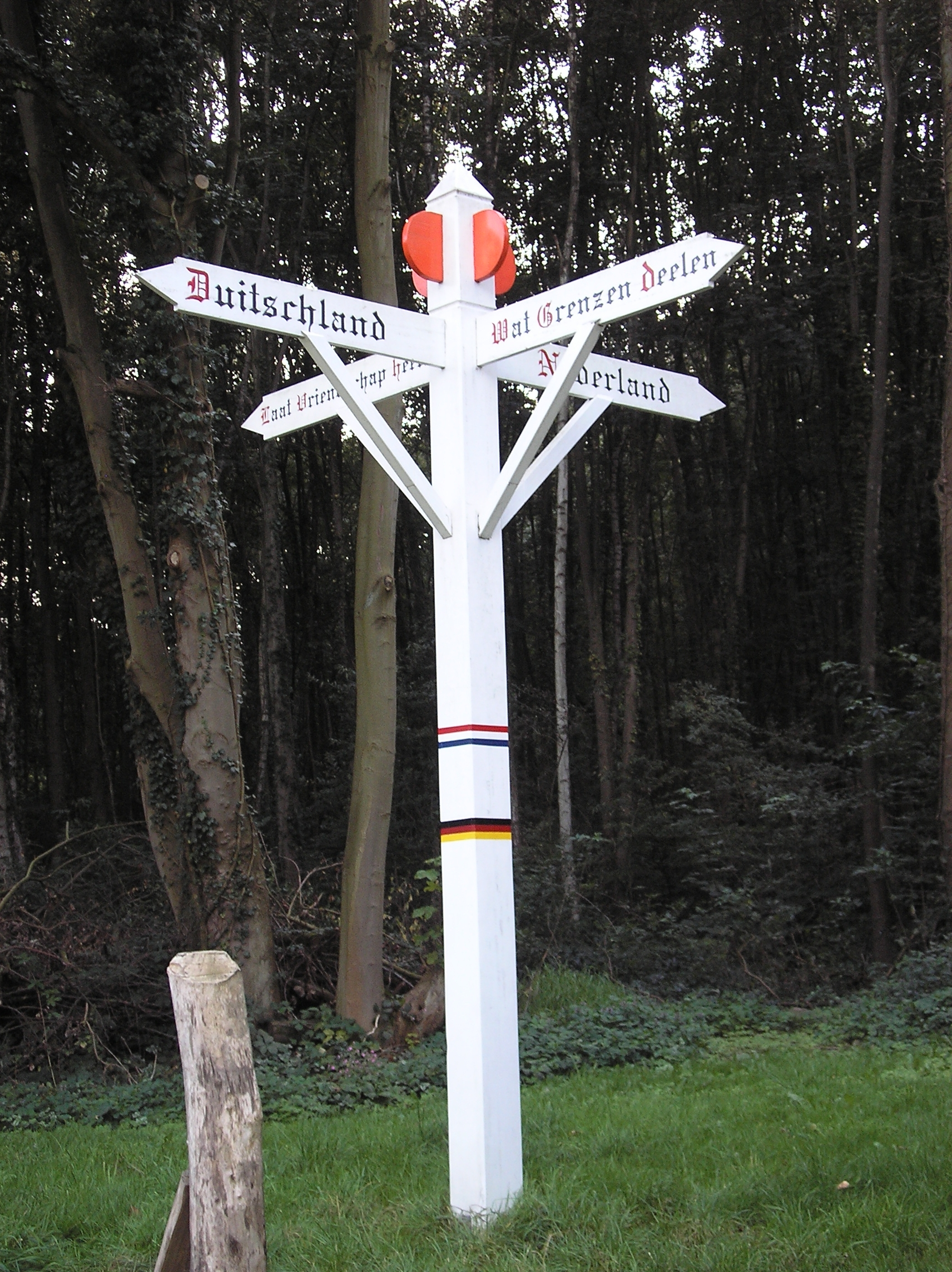 Pfahl an der ehemaligen deutsch-niederländischen Grenze bei Ubbergen/Niederlande